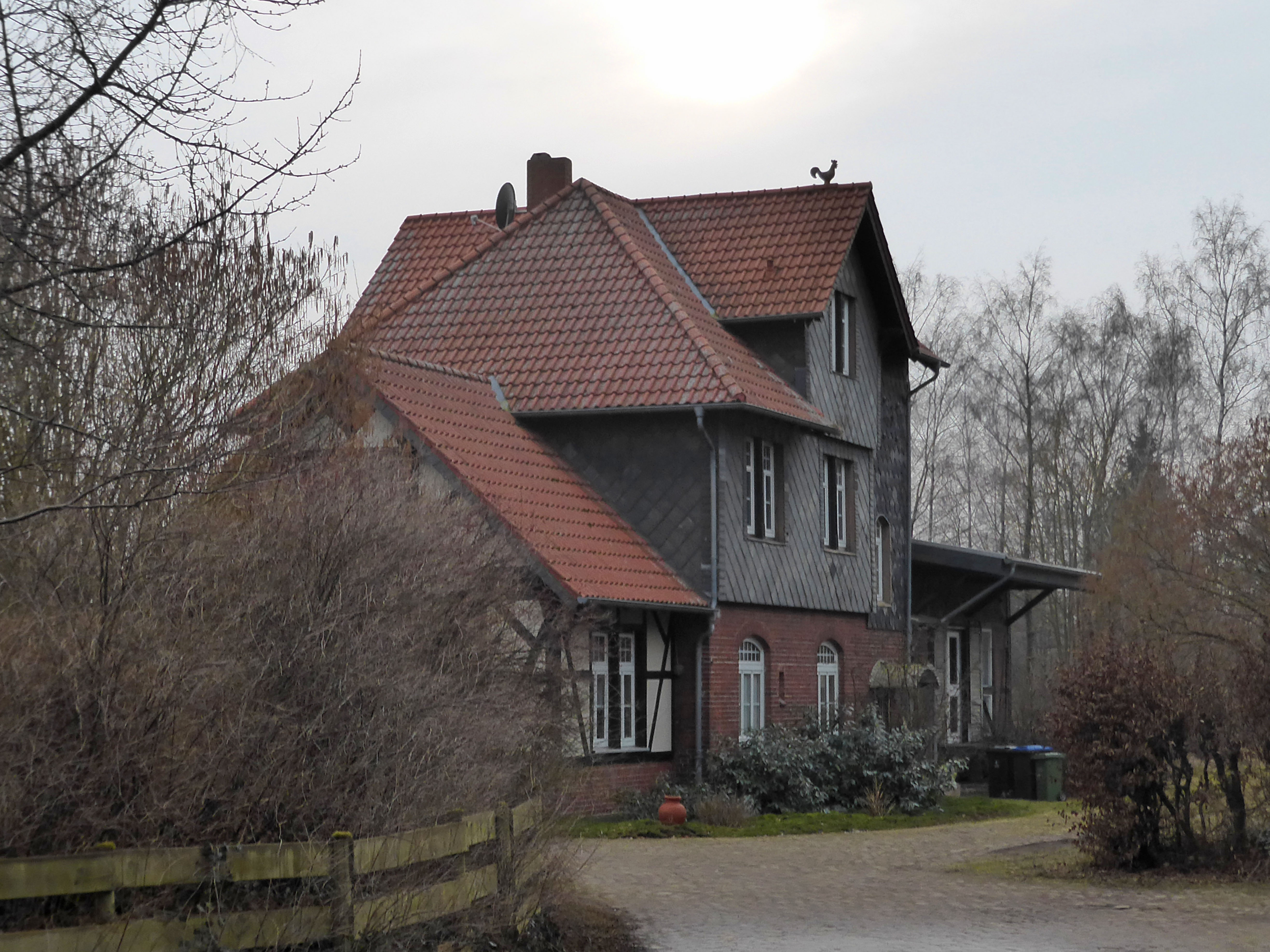 Ehemaliger Bahnhof in Neindorf bei Wolfsburg.